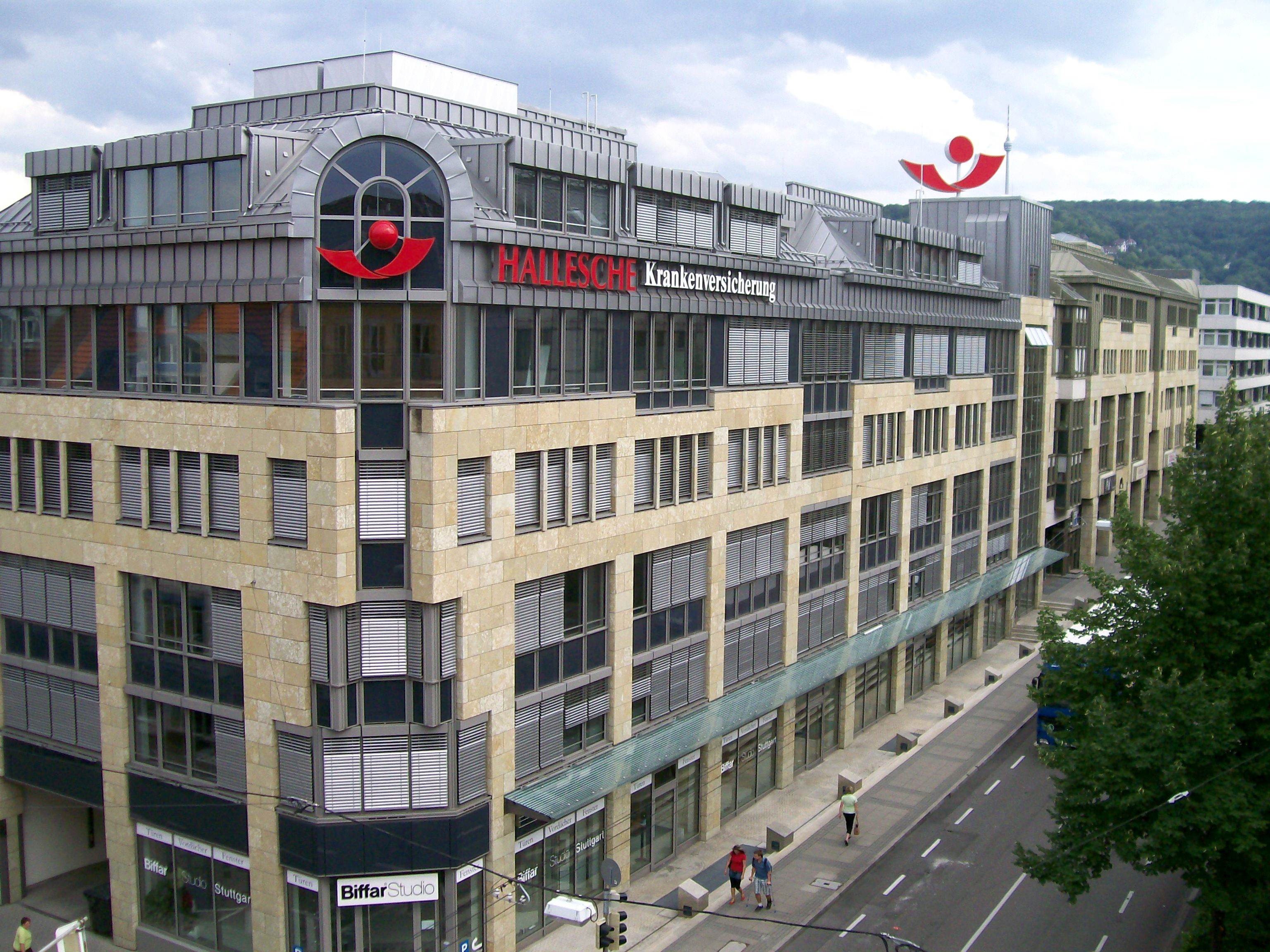 Ansicht der Direktion der Hallesche Krankenversicherung in Stuttgart